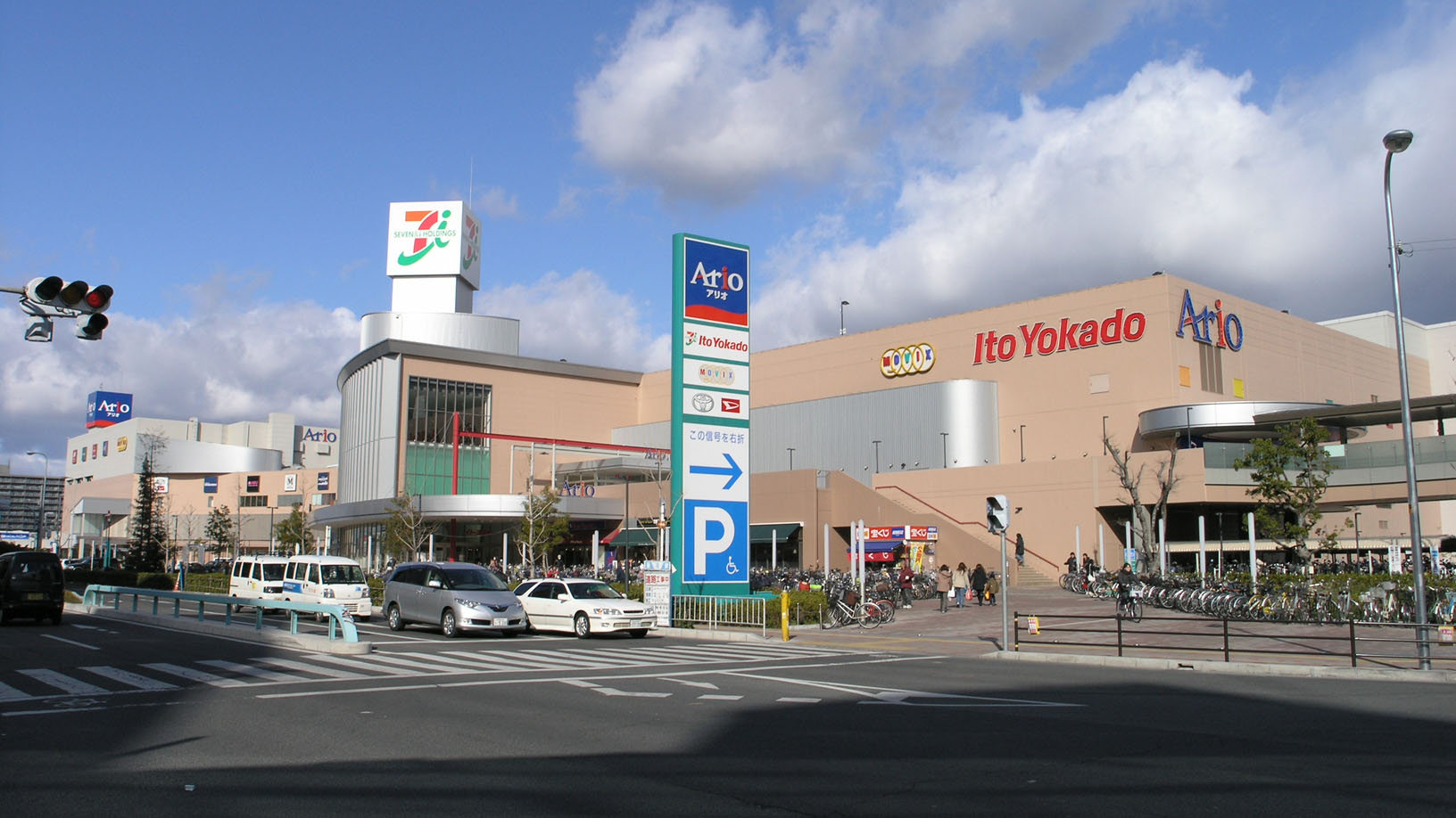 Ario Yao in Yao, Osaka, Japan